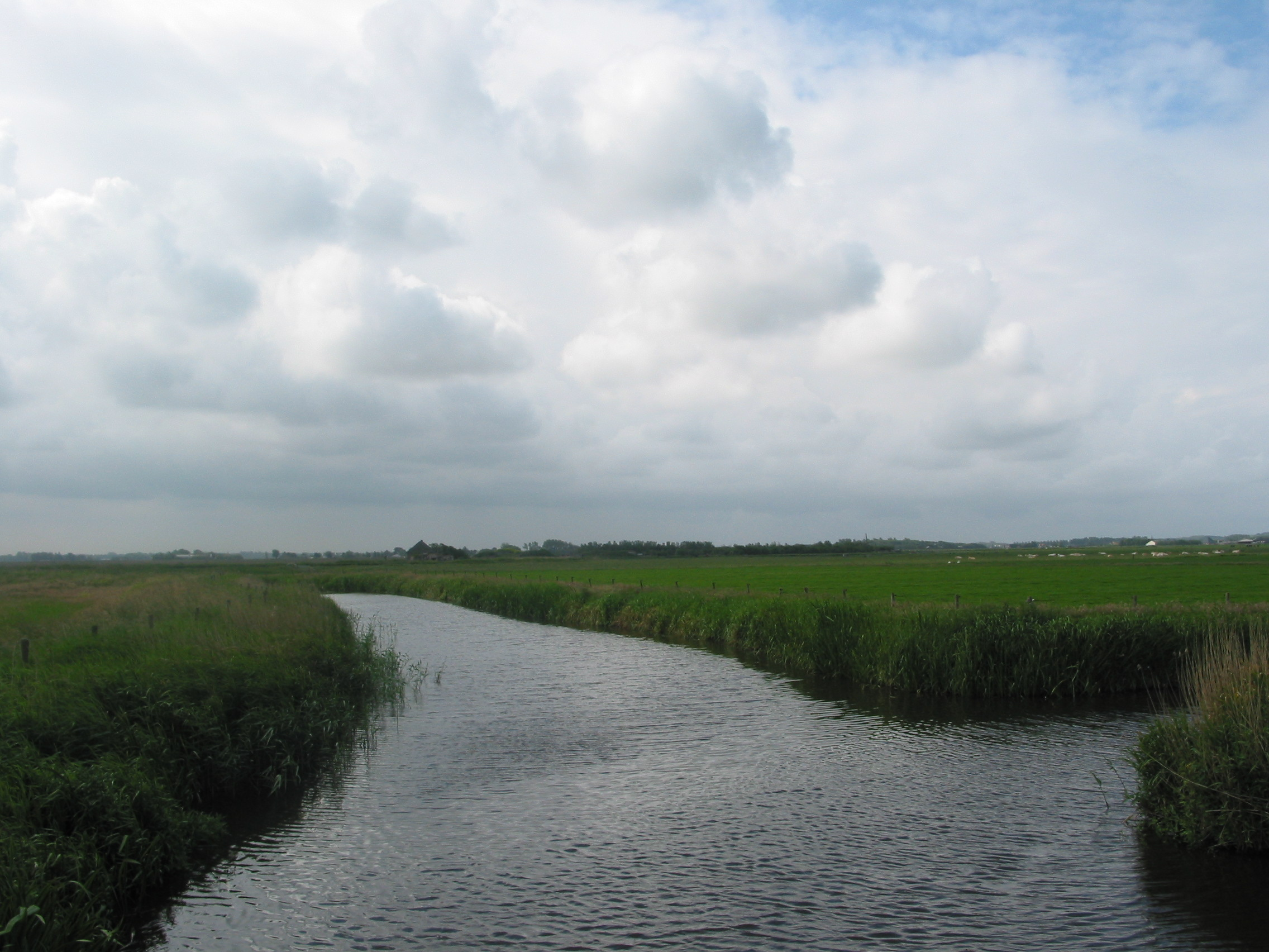 Bergermeer